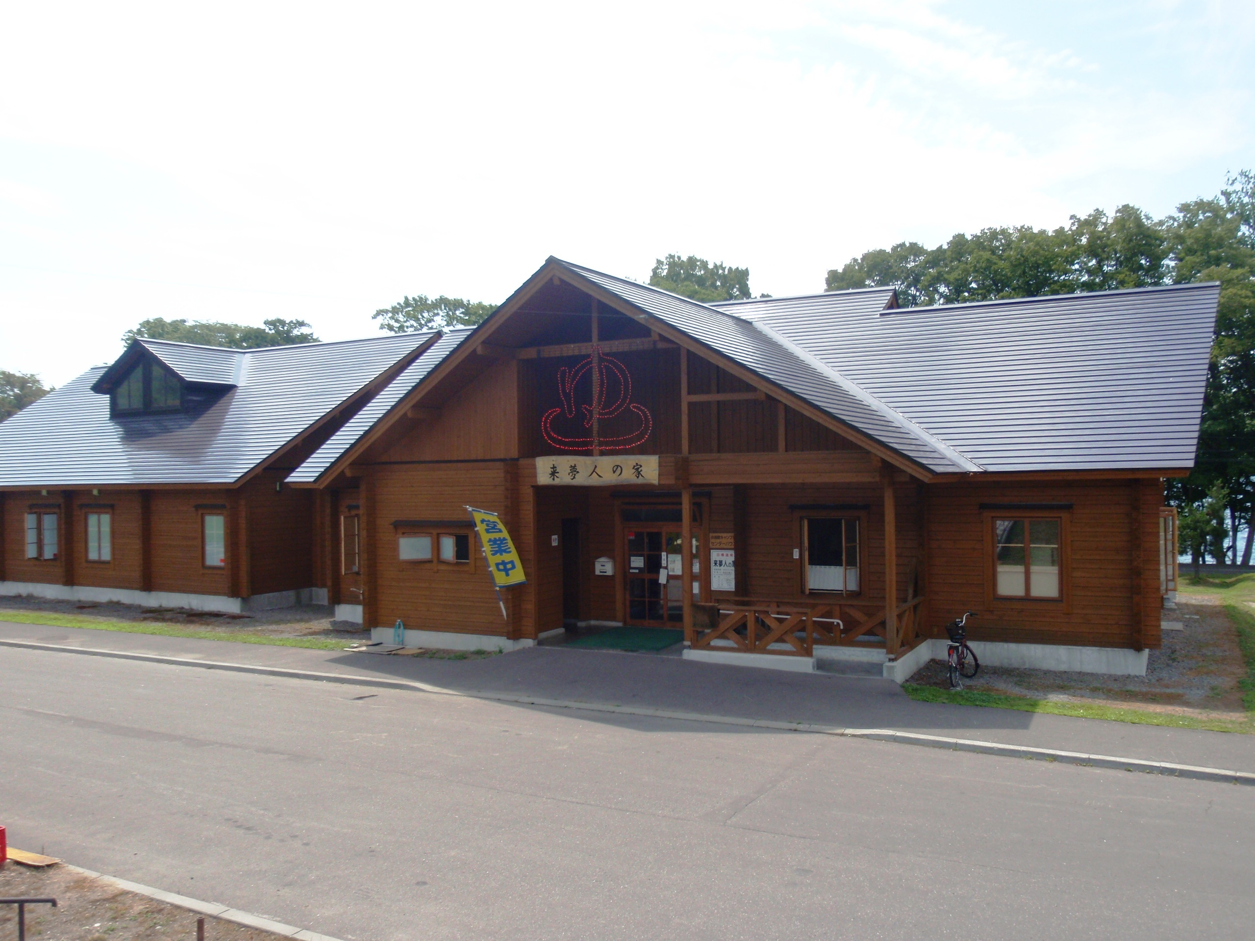 仲洞爺温泉、来夢人の家